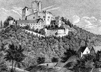 obrázek z Landštejn na rytině J. Richtera z r. 1847